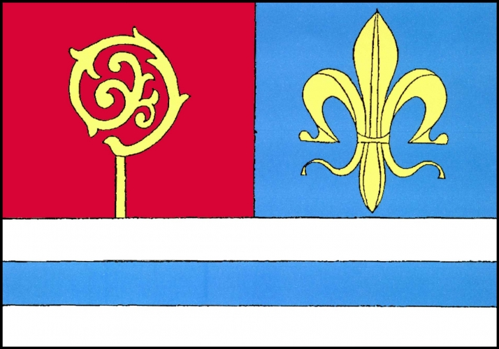 Vlajka, Čistá, okres Svitavy